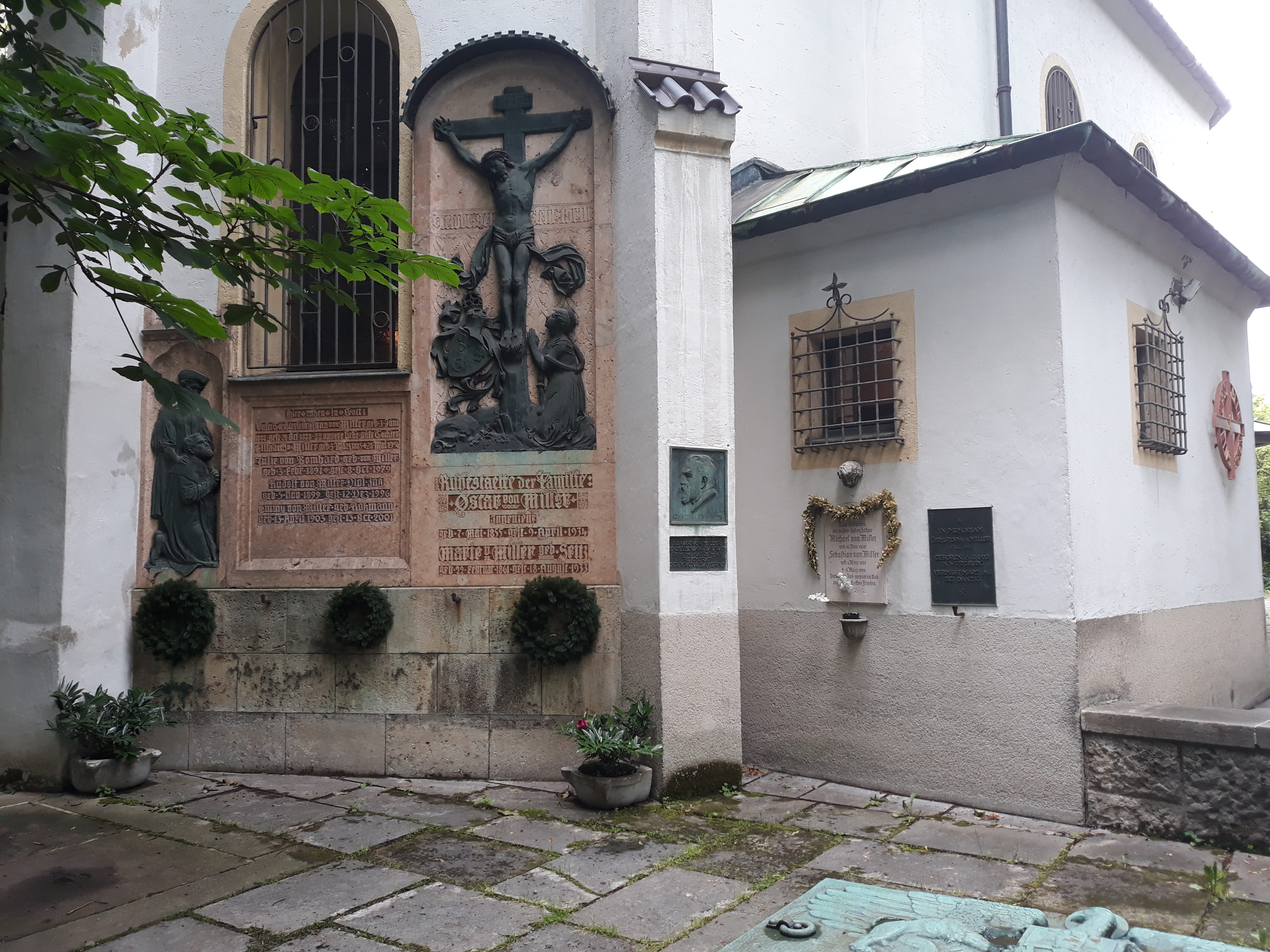 Die Familiengrabstätte des Ingenieurs und Museumsgründers Oskar von Miller und seiner Ehefrau, der Malerin Marie, an der Winthirkirche in Neuhausen, München.